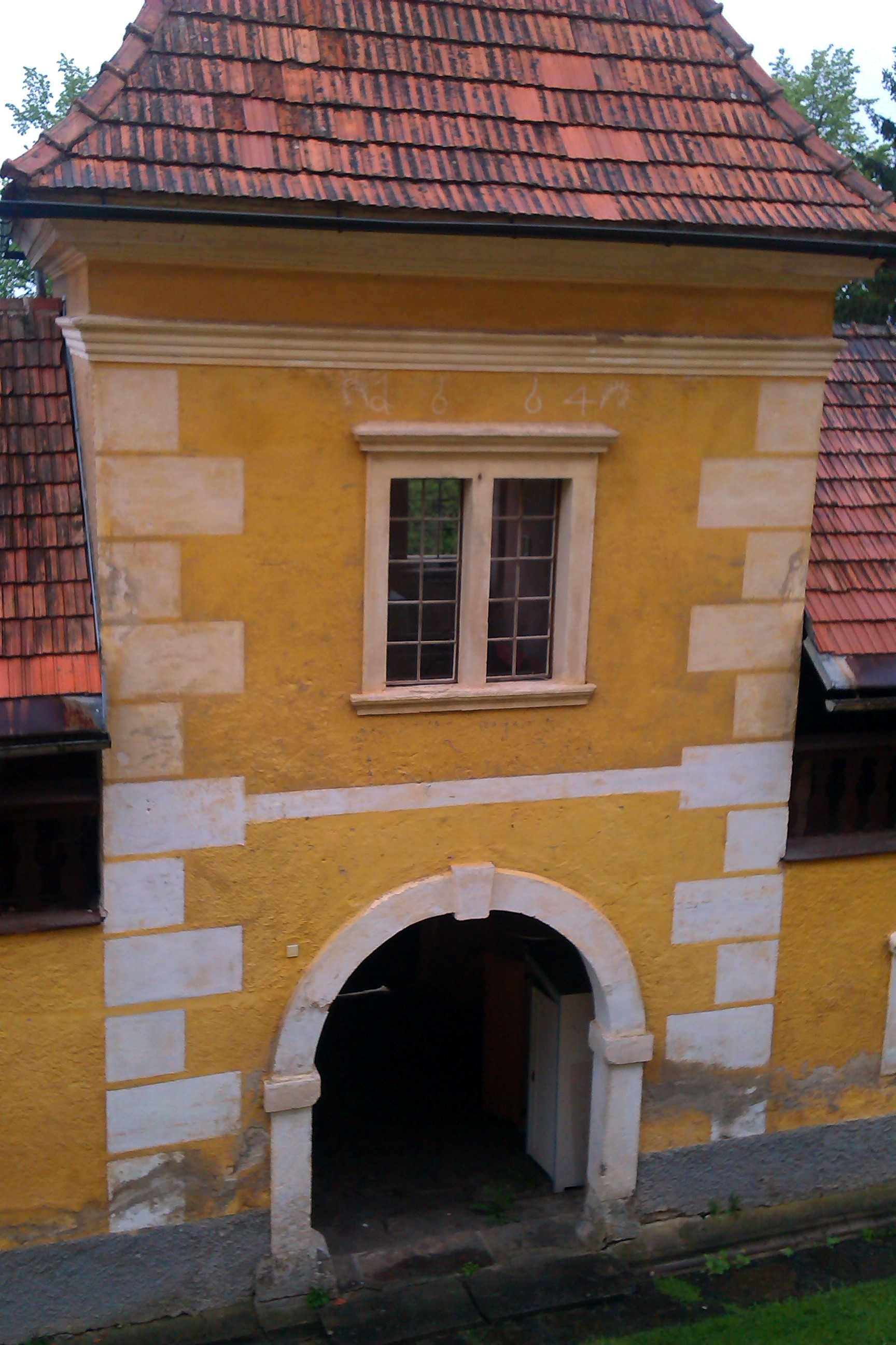 Schloss Limberg bei Wies, Torgebäude Mittelteil